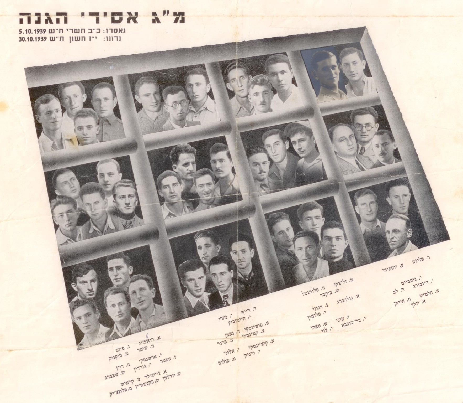 שמותיהם וצילומיהם של מ"ג חברי הגנה שנאסרו ב-5 לאוקטובר 1939